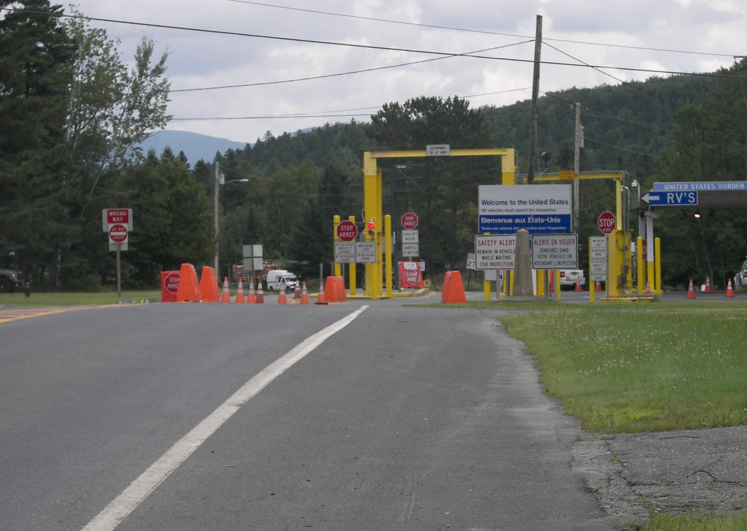 Frontiere Coburn Gore